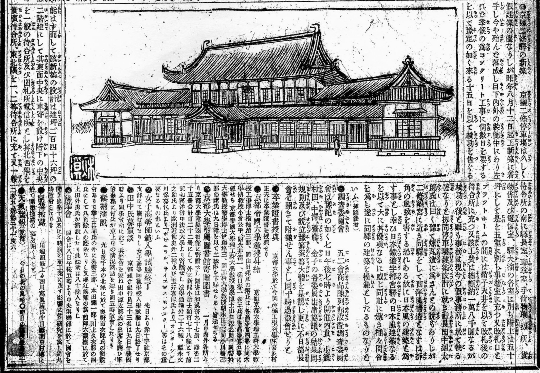 二条駅駅舎改築時の大阪朝日新聞京都付録